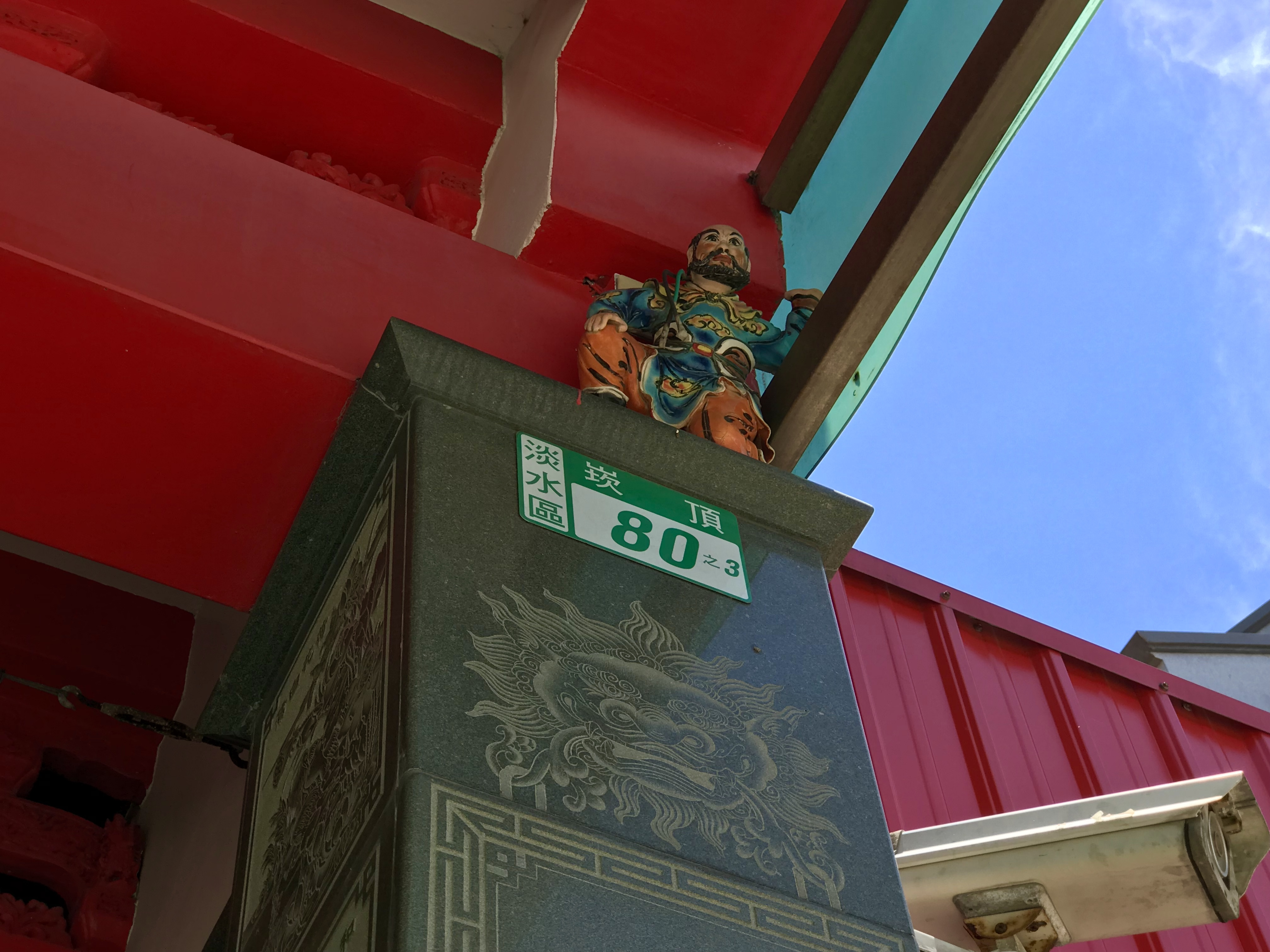 中文（台灣）: 淡水太子廟門牌